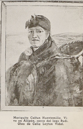 Pintura de Celia Leyton